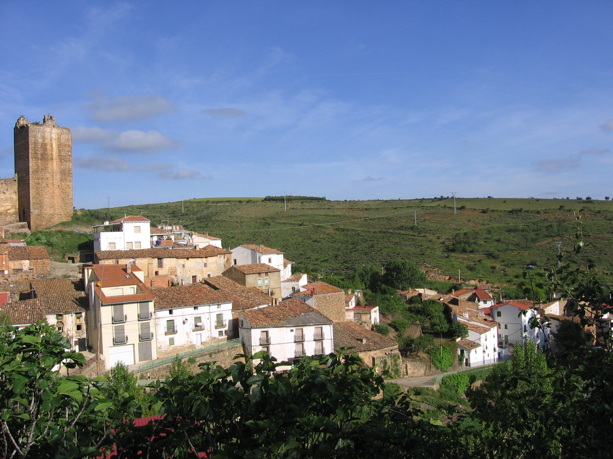 Foto de Vozmediano (Soria)